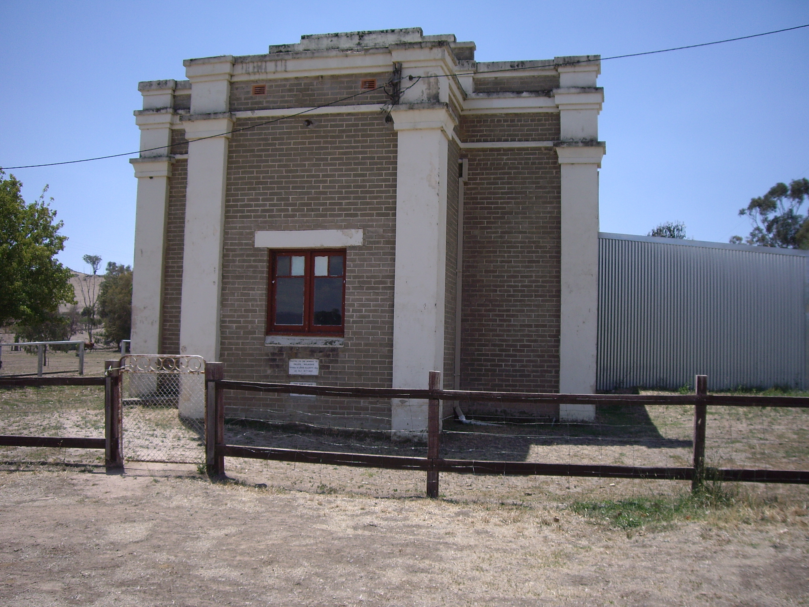 Lacmalac Hall